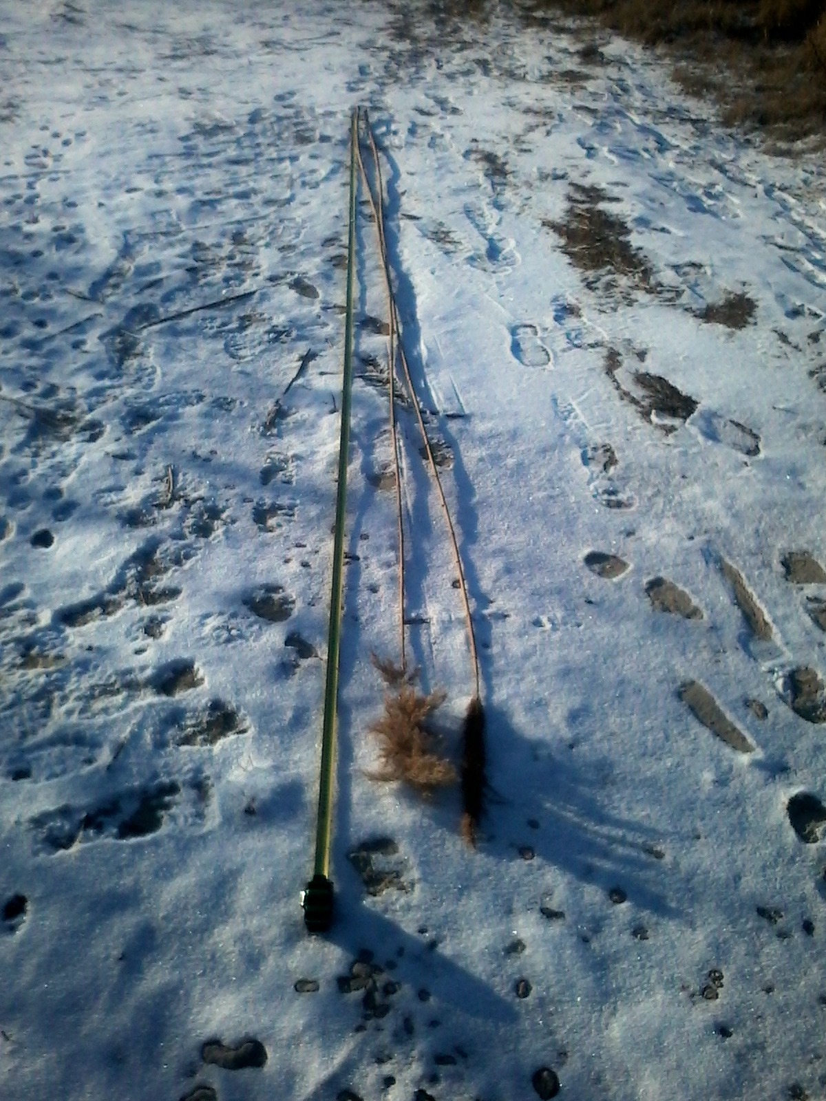 Знято на березі Південного Бугу мобілкою Samsung, рулетка - п'ять метрів.